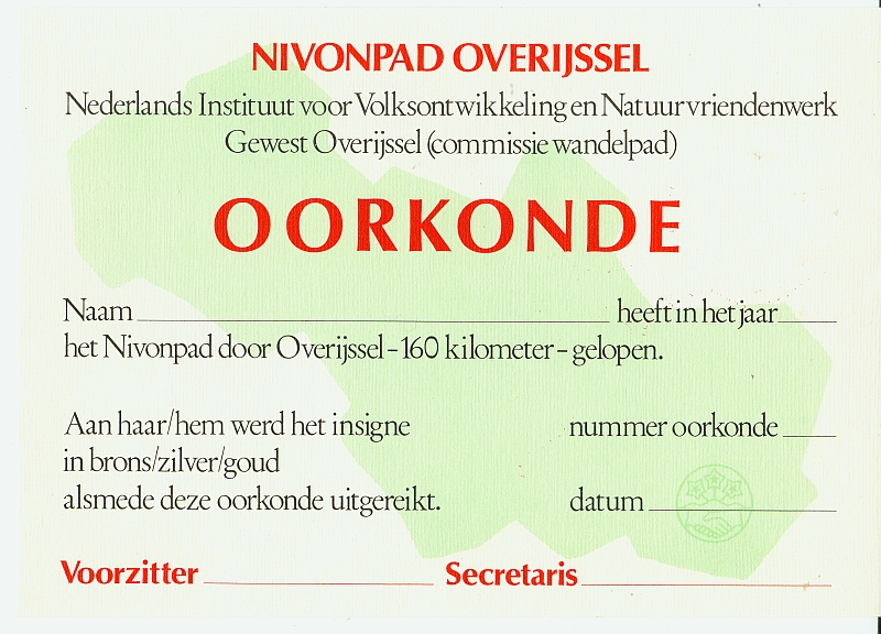 Oorkonde zoals die vroeger werd toegestuurd na voltooien van dit pad